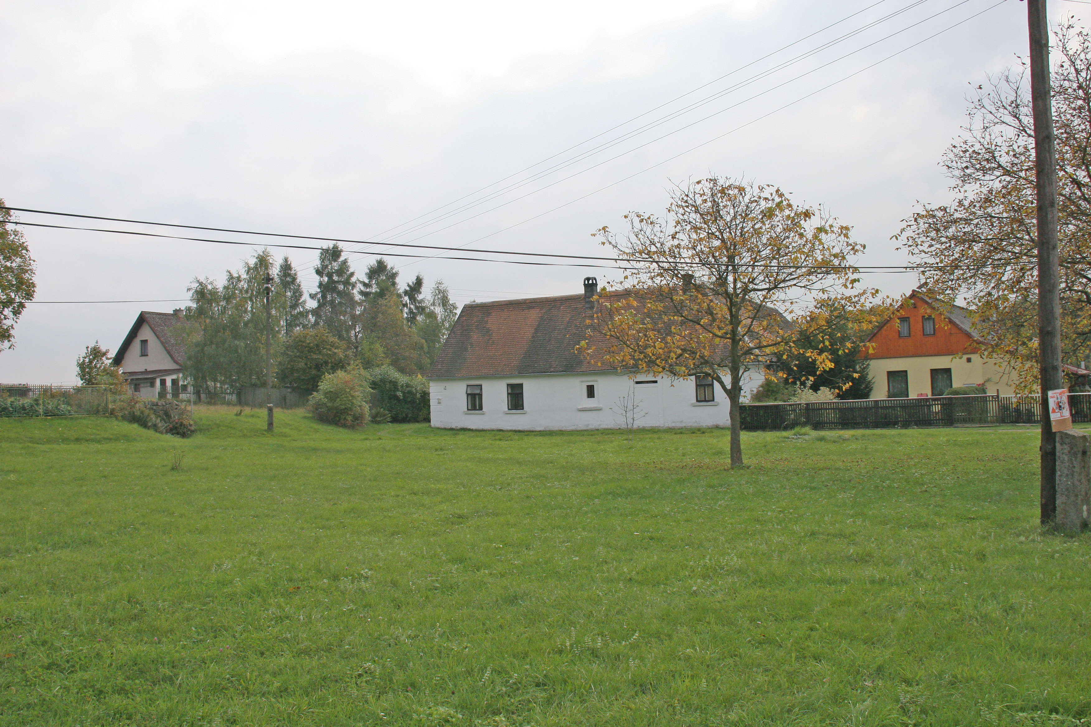 Doubrava náves